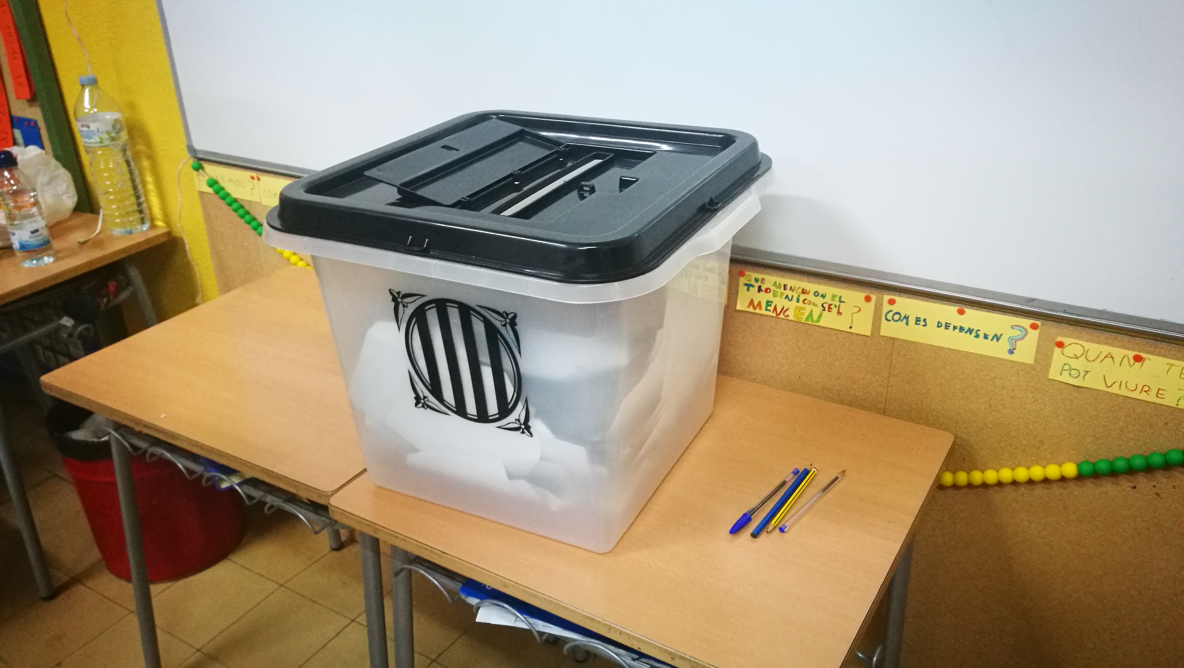 urna del Referèndum d'Independència a cal Bassacs. Wikipedia: Catalan independence referendum, 2017 See also category: 2017 Catalan Independence Referendum in Gironella.